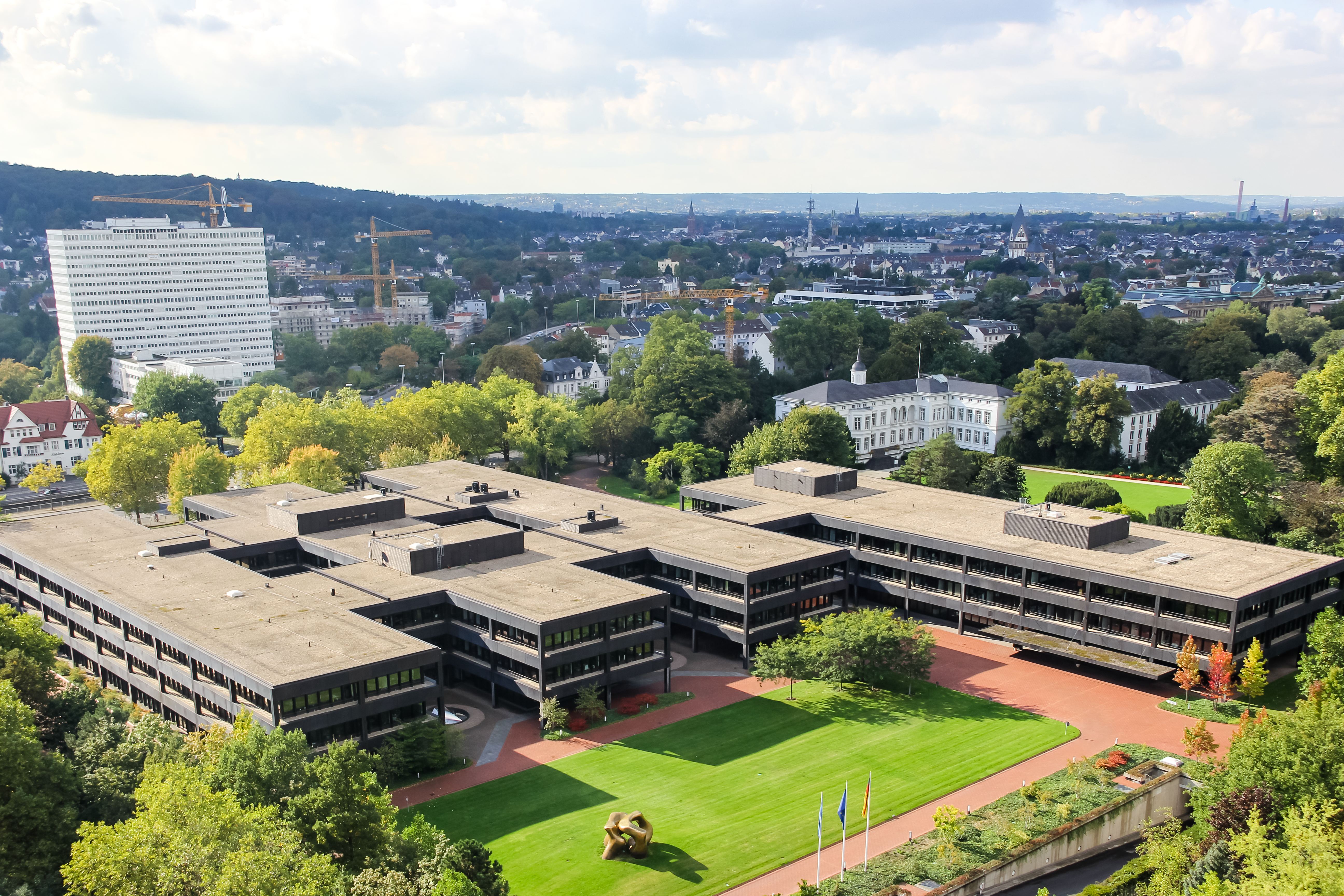 Bonn Marriott World Conference Hotel; Blick von der Terrasse des Sky Restaurants auf das ehemalige Bundeskanzleramt, rechts dahinter das Palais Schaumburg.